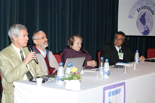 VII MEDNESP. Mesa com os físicos B. Allan Wallace, Padma Samten, Marlene Rossi Severino Nobre e Roberto Lúcio Vieira de Souza. UFRGS, 2009